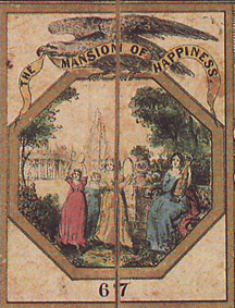 Особняк Счастье пространстве конца